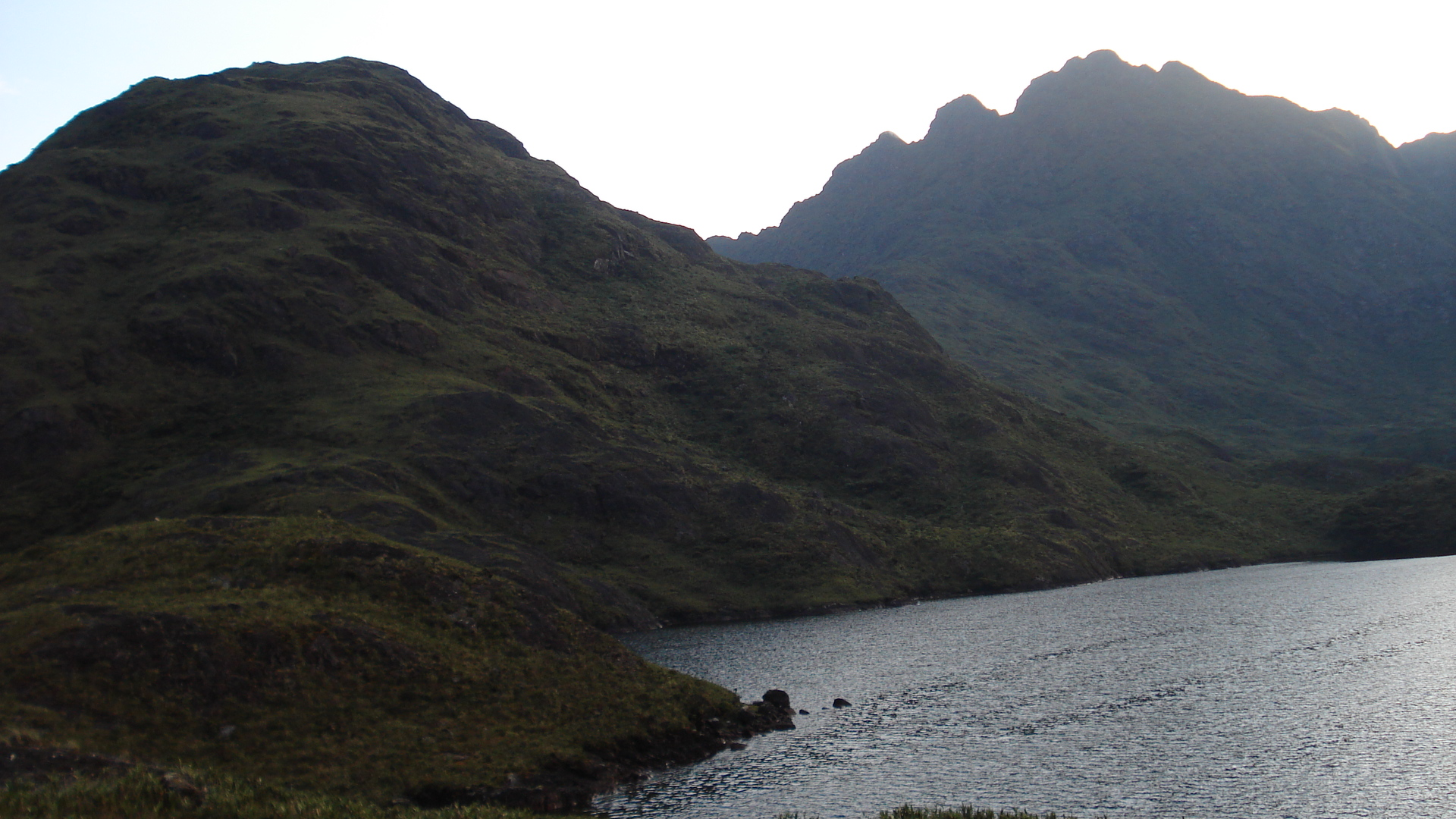 La primera Laguna del sistema Lacustre lagunas del compadre que se avista después de la caminata de 14 kilómetros desde Loja